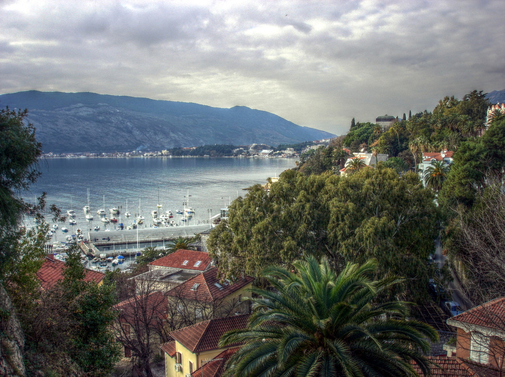 Поглед на луку са куле Форте Маре (HDR)